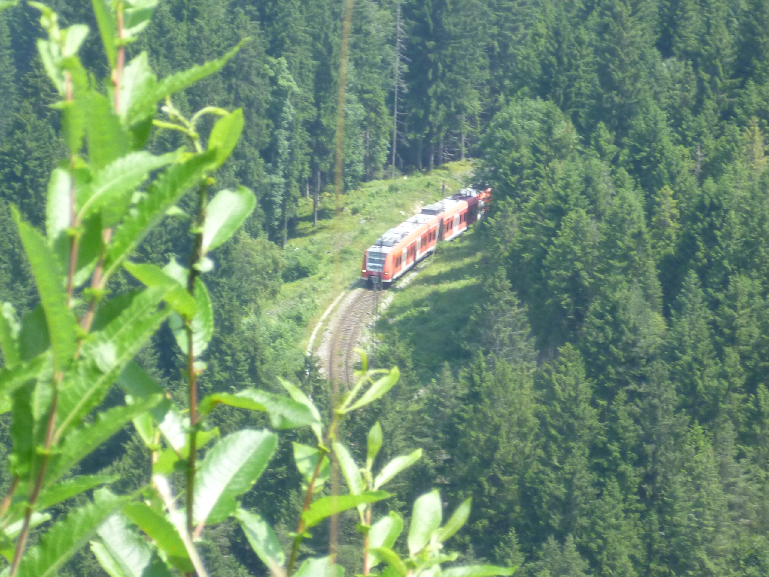 DB-Baureihe 425 auf der Außerfernbahn Richtung Garmisch-Partenkirchen zwischen Bad Kreckelmoos und dem Katzenbergtunnel